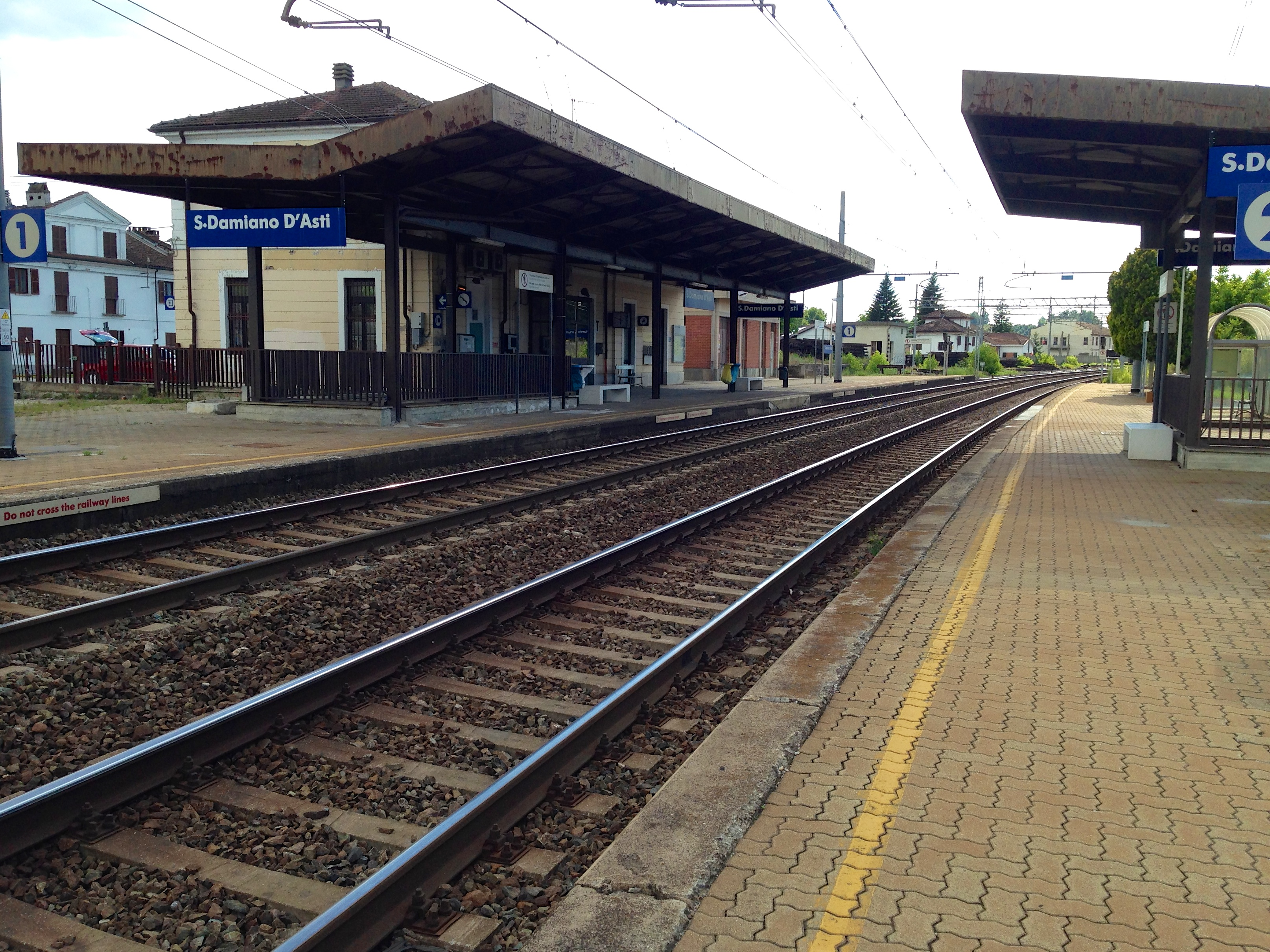 Stazione di San Damiano d'Asti